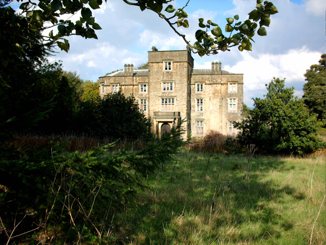 Winstanley Hall